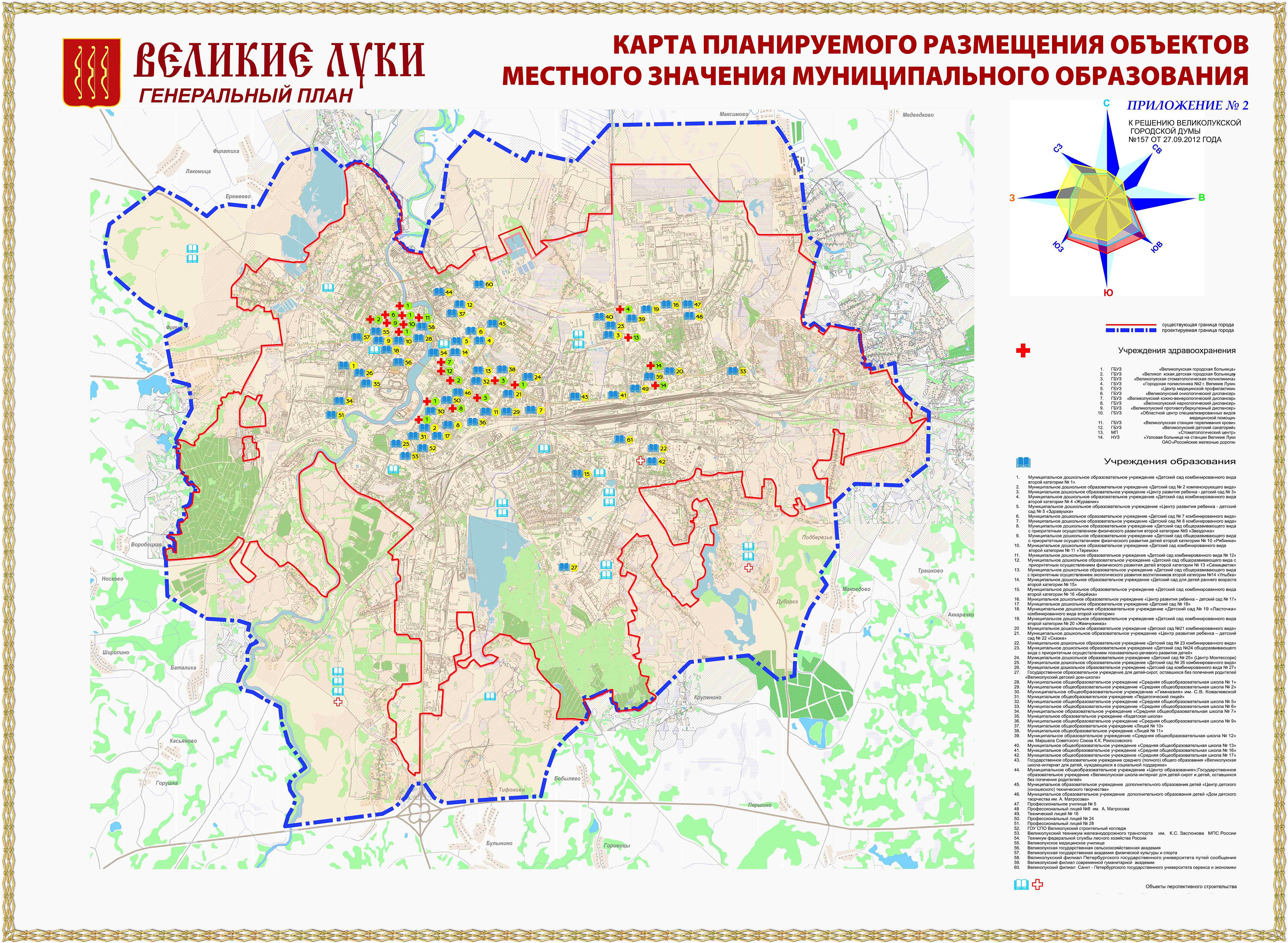 Официально принятый документ (Статья ГК 1264. п. 2): Карта планируемого размещения объектов местного значения муниципального образования «Город Великие Луки» (Приложение № 2 к решению Великолукской городской Думы от 27.09.2012 № 137).